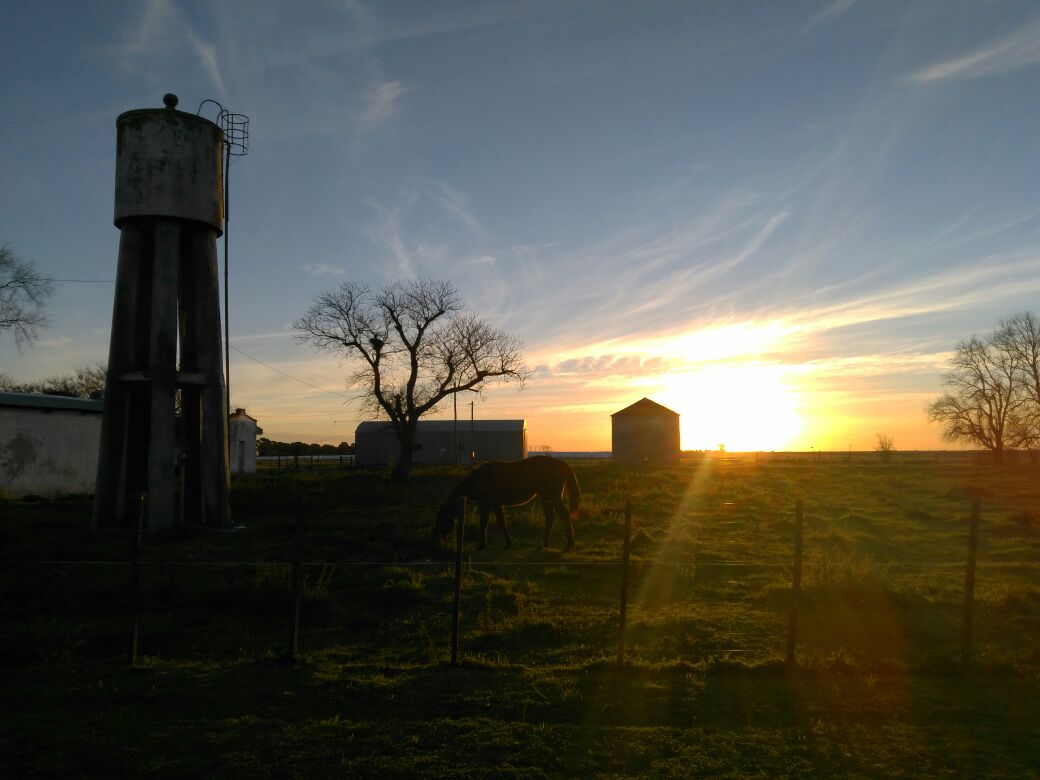 En esta imagen podemos ver el caldén, que es un símbolo de la geografía cultural pampeana. Considerado patrimonio natural en La Pampa, está íntimamente ligado a la fisonomía y la historia de la provincia. El escudo de La Pampa tiene un caldén sobre fondo azul en su campo superior. Se le ha rendido homenaje en poesías y canciones. Por otro lado, el amanecer pampeano, es un expectaculo imperdible y hermoso, que se origina en el horizonte al oeste.